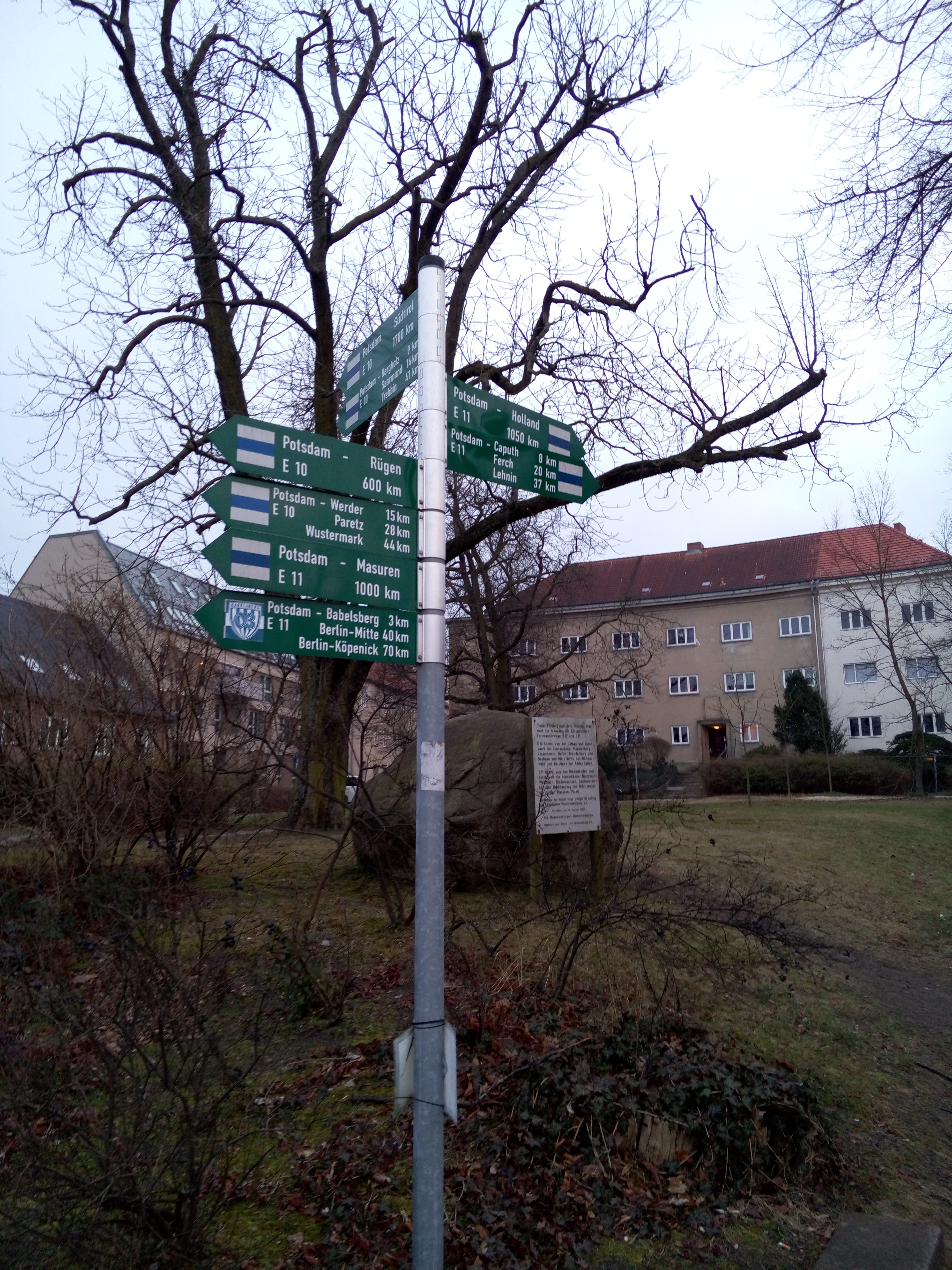 Das Bild zeigt die Kreuzung der beiden Europäischen Fernwanderwege E10 und E11 in Potsdam. Im Vordergrund sind Wegschilder zu sehen, die die Entfernung zu verschiedenen Stationen der beiden Wanderwege angeben. Im Hintergrund ist eine Grünfläche mit einem Findling zu sehen. Auf diesem ist eine Hinweistafel der Brandenburger Wandervereine aus dem Jahr 1993 angebracht.